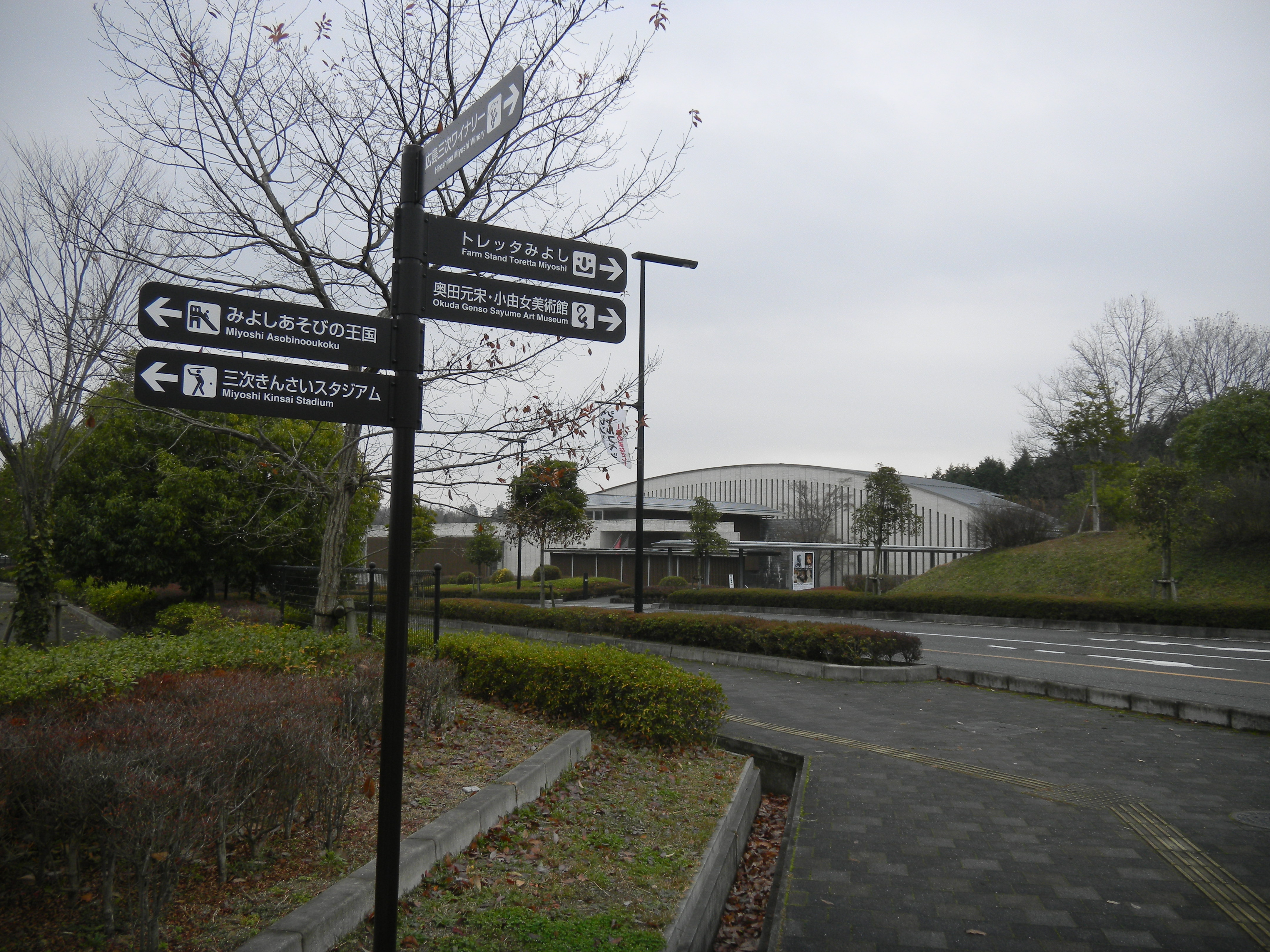 奥田元宋・小由女美術館